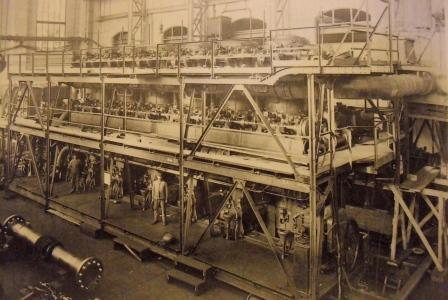 Fertig montierter Motor im Prüfstand